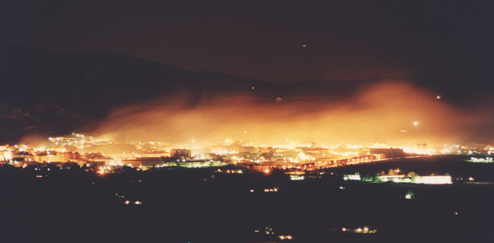 Imagen de Onil durante la "nit de les fogueres"